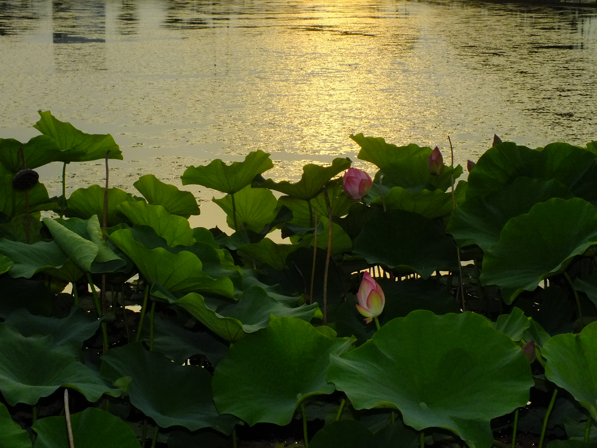 Hiraike-park (平池公園 大賀ハス)兵庫県加東市東古瀬